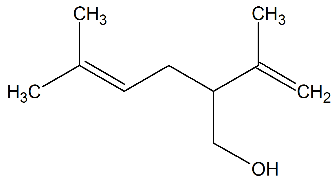 Lavandulol ((±)-2-Isopropenyl-5-methyl-4-hexen-1-ol.) ist ein Terpen, das in Lavendelöl vorkommt